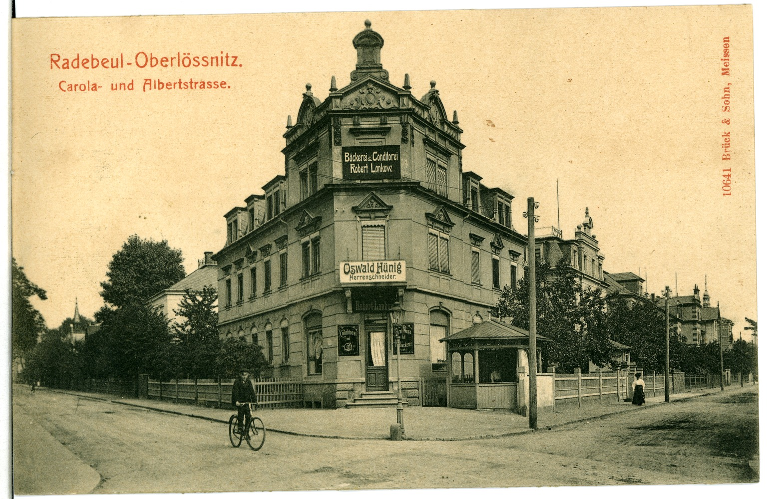 Radebeul; Carola - und Albertstraße: Wichernstraße 12 This postcard is from publisher Brück & Sohn in Meißen ( postcard has a unique number 10641 and is available in a higher resolution at the publisher. This images was uploaded in a cooperation project between Wikipedians and the publisher.